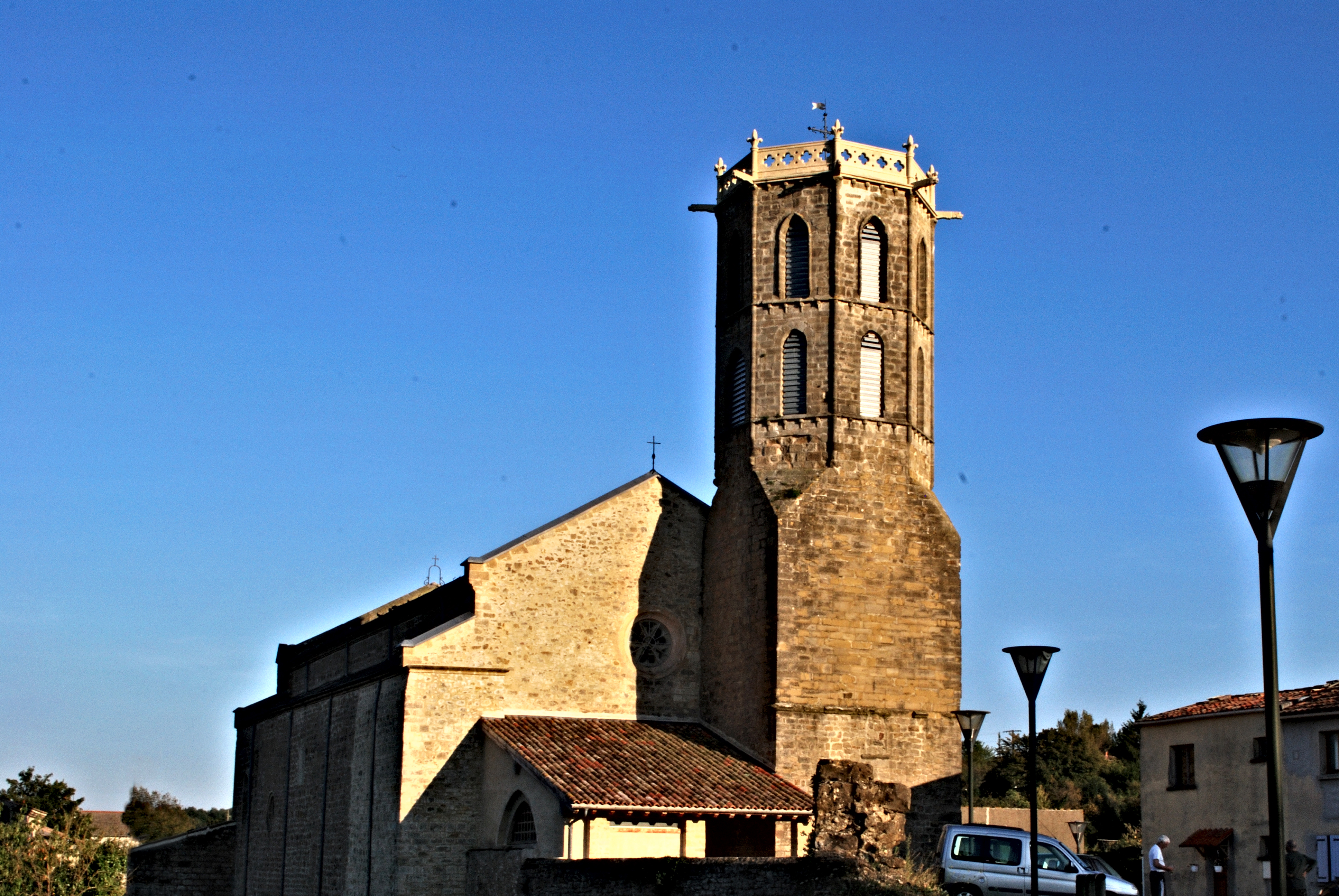 Vue d'ensemble de l'église du Saint-Sacrement de Laroque-d'Olmes.